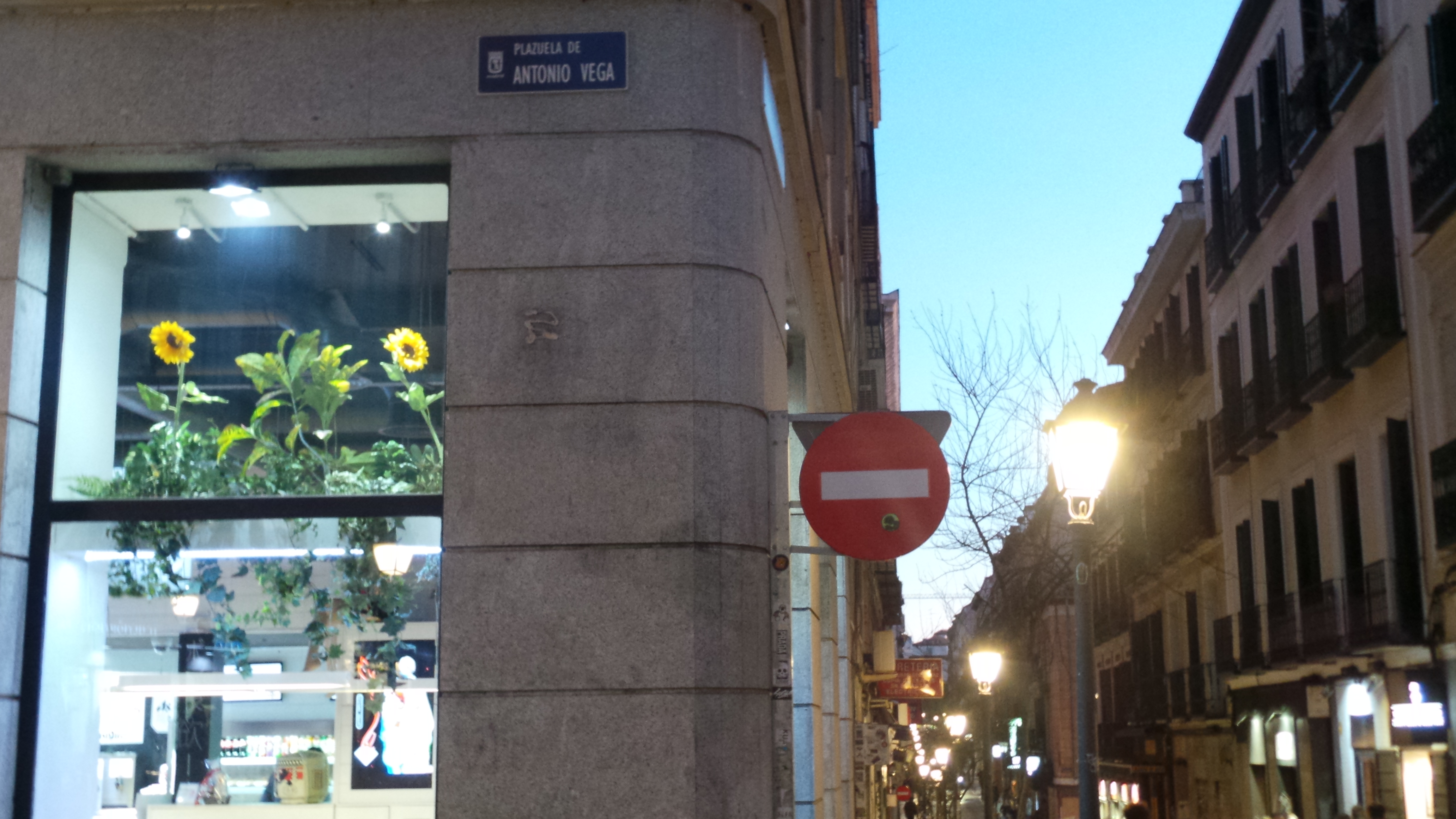 Plazuela de Antonio Vega, en el barrio de Malasaña de Madrid. Situada en la confluencia de la calle Corredera Alta de San Pablo y de las calles Velarde y Fuencarral. Fue inaugurada en homenaje al músico Antonio Vega el 23 de marzo de 2011. Imagen de la placa conmemorativa. Al fondo la Corredera Alta de San Pablo. Calles de Madrid